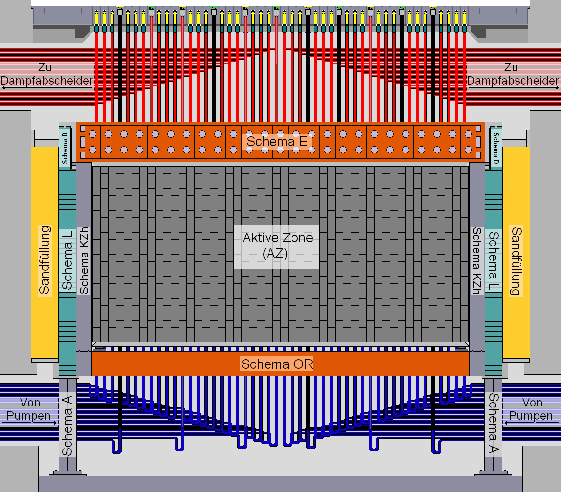 Technischer Reaktoraufbau des RBMK mit Elementnamen